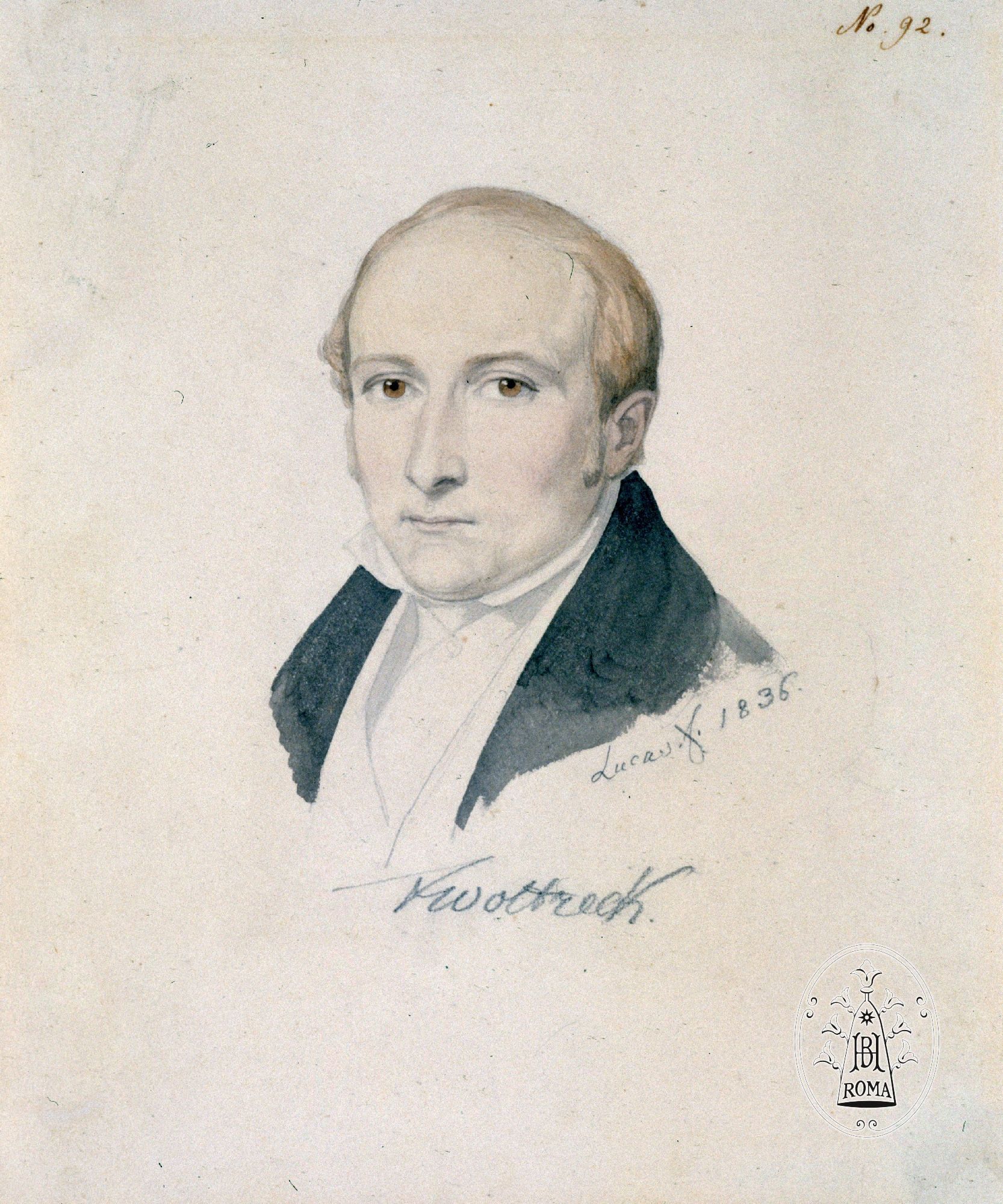 Porträt Franz Woltreck, gezeichnet von August Lucas (zugeschrieben), Rom 1836